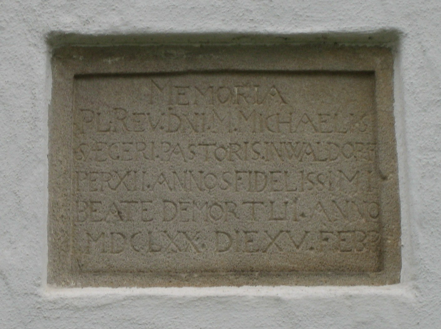 Walddorfhäslach, Evangelische Pfarrkirche Walddorf, Erinnerungstafel Pfarrer Seeger 1670